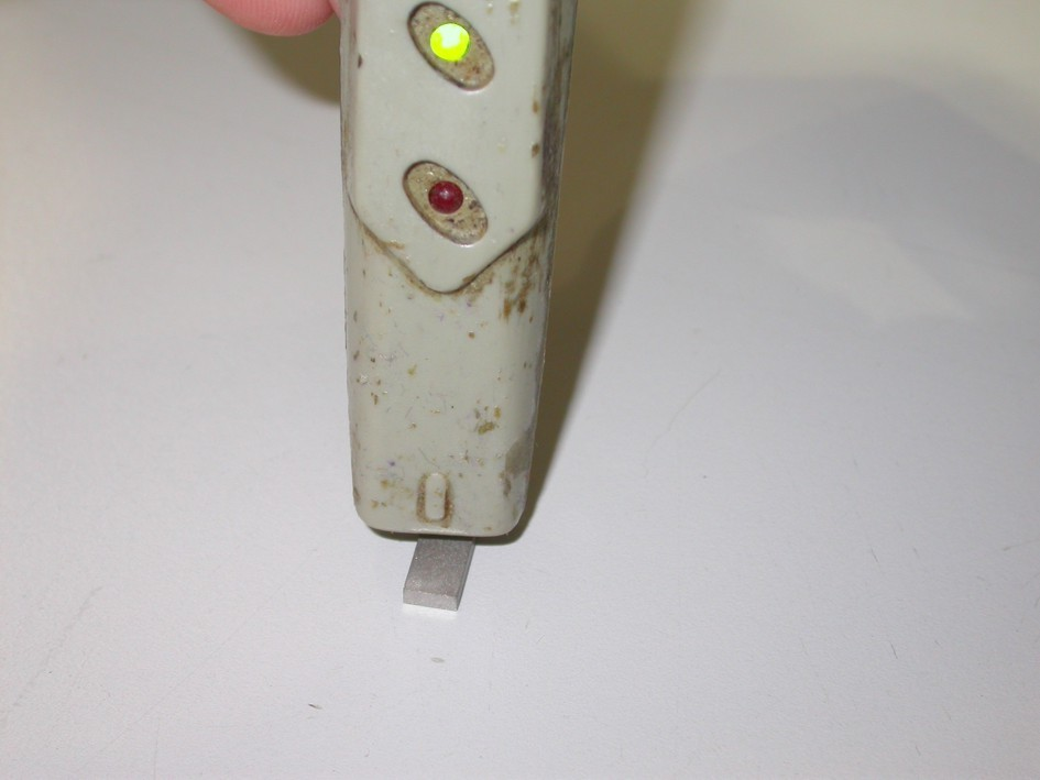 Magnetischer Polpruefer